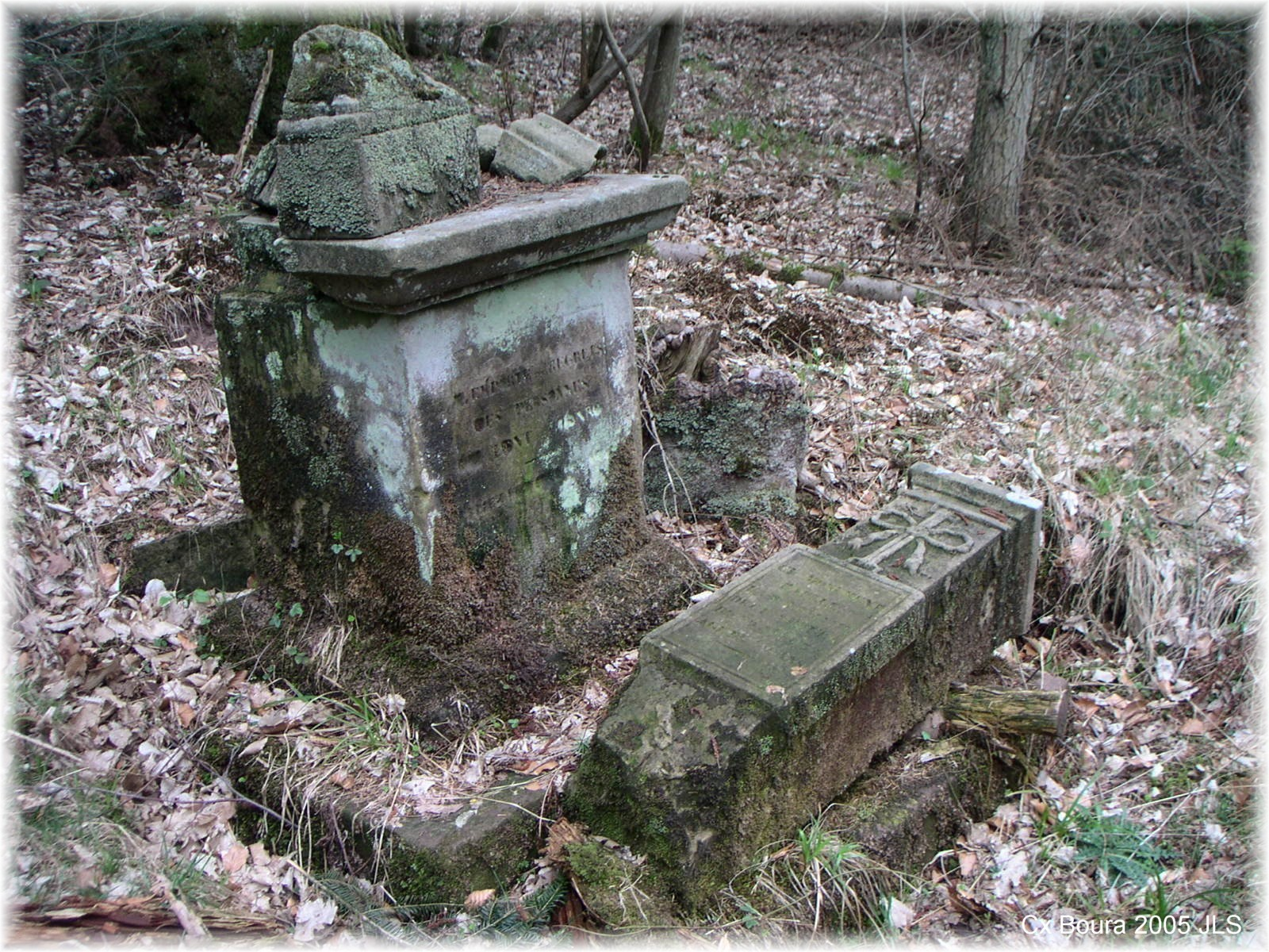 croix Boura, ce qui en reste, très altéré, en 2006 - rive gauche du ruisseau du Charmois, route forestière de la chapelle du Bon Dieu.